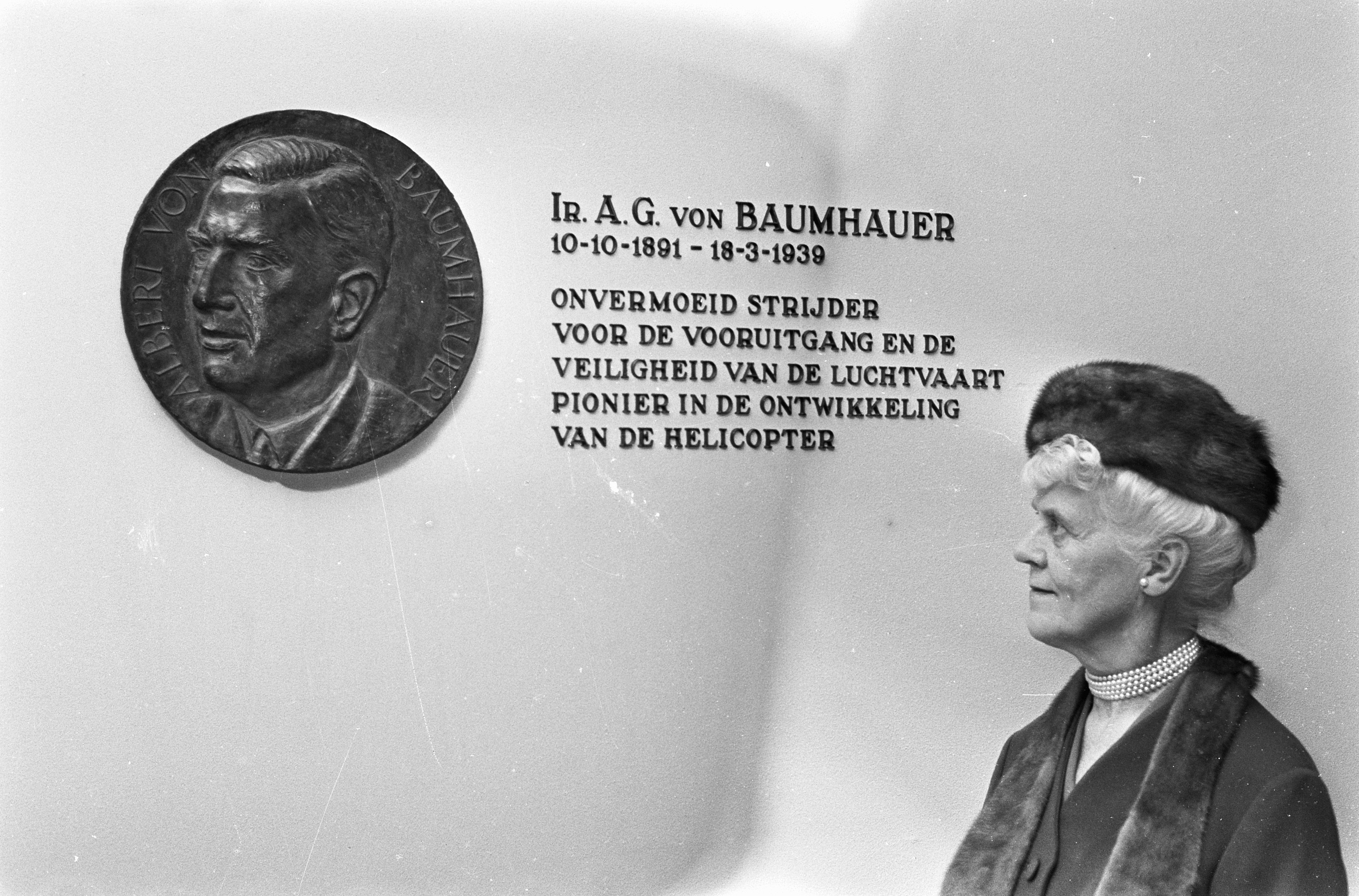 Collectie / Archief : Fotocollectie Anefo Reportage / Serie : [ onbekend ] Beschrijving : Plaquette onthuld van ir. A. G. von Baumhauer op Schiphol. Mevrouw Von Baumhauer bij de plaquette van haar overleden echtgenoot Datum : 9 november 1967 Locatie : Noord-Holland, Schiphol Trefwoorden : onthullingen Fotograaf : Kroon, Ron / Anefo Auteursrechthebbende : Nationaal Archief Materiaalsoort : Negatief (zwart/wit) Nummer archiefinventaris : bekijk toegang 2.24.01.05 Bestanddeelnummer : 920-8443